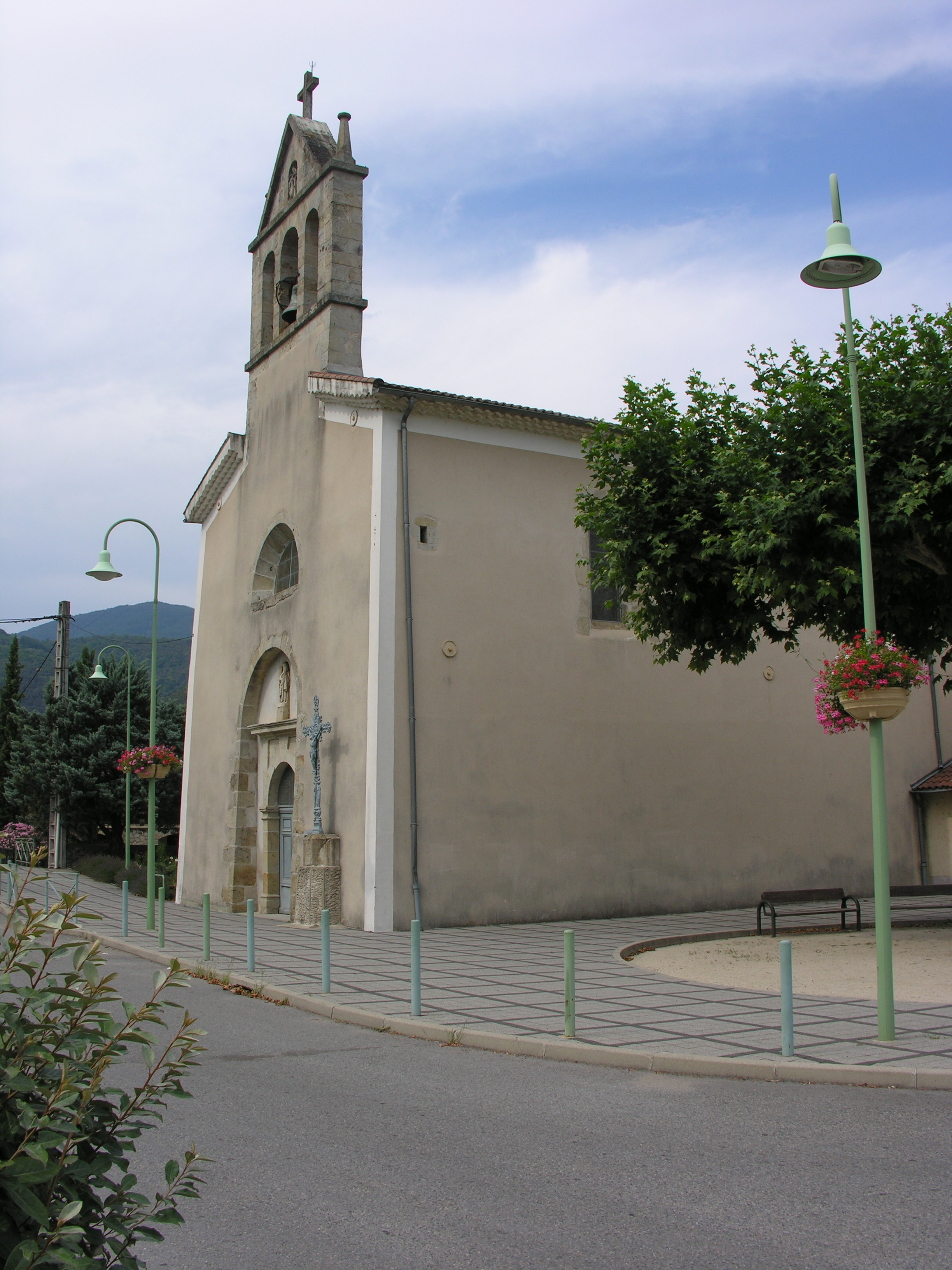 Eglise de Lalevade-d'Ardèche en 2006. Auteur : Ami Barbe